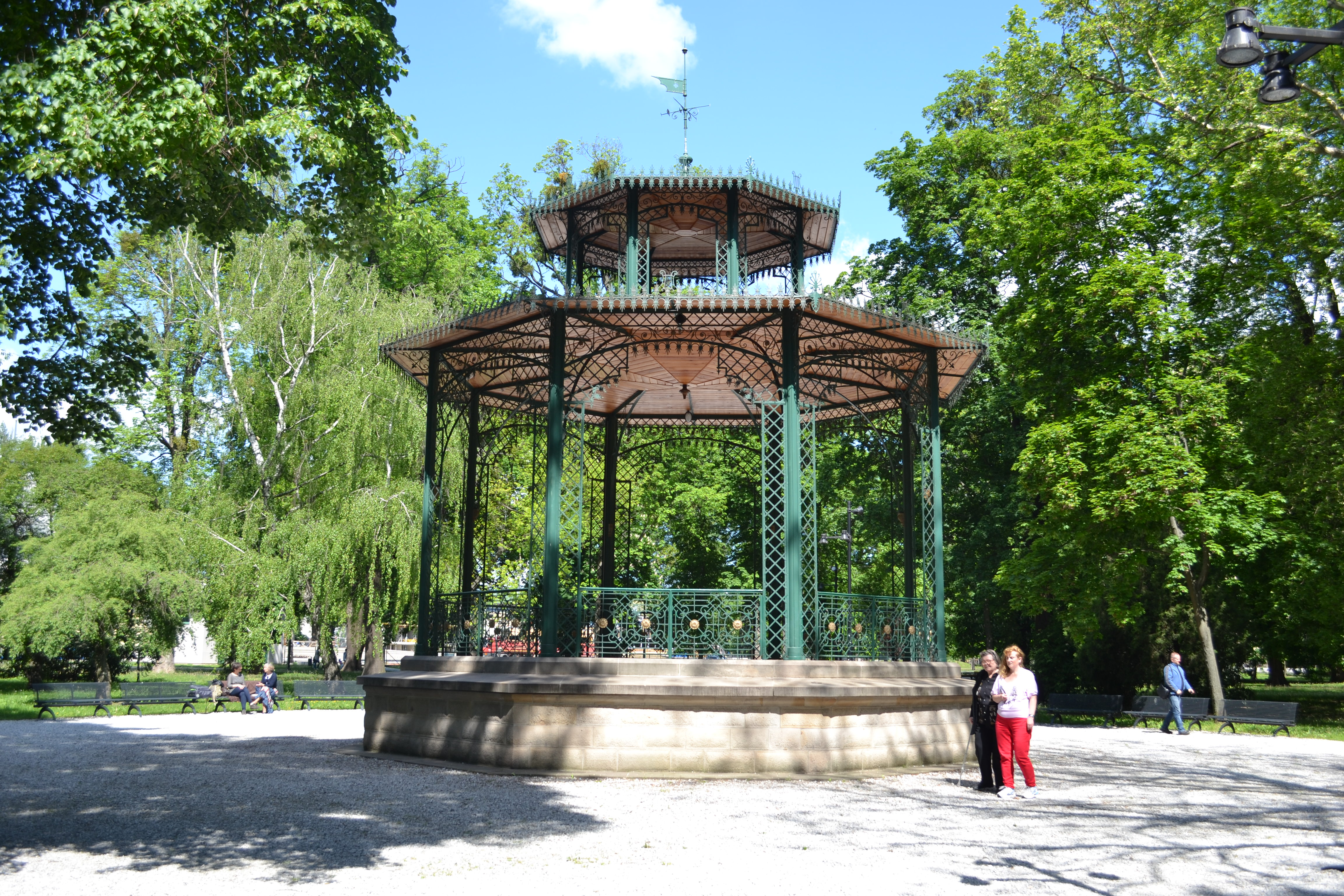 Hudobný altánok postavený v roku 1885 podľa plánu mestského staviteľa Júliusa Pöschla. Železnú konštrukciu vyhotovil umelecký kováč majster Kozzig.